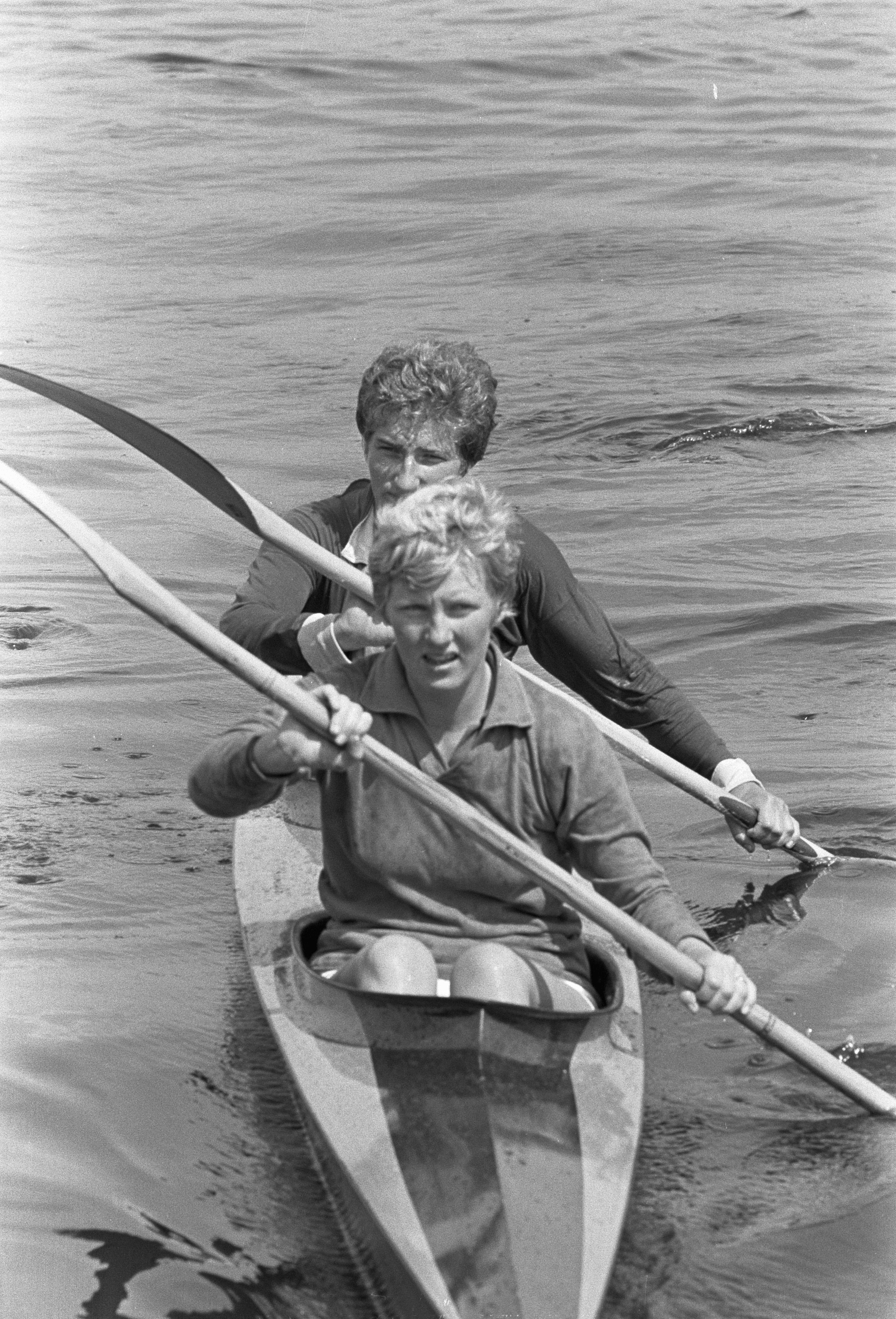 Collectie / Archief : Fotocollectie Anefo Reportage / Serie : [ onbekend ] Beschrijving : Kampioenschap van Nederland Kanovaren, de K2 dames Thea Duif en Mieke Jaapies Datum : 26 juni 1966 Locatie : Amsterdam, Amsterdamse Bos Trefwoorden : kanoën Persoonsnaam : Duif, Thea, Jaapies, Mieke Fotograaf : Kroon, Ron / Anefo Auteursrechthebbende : Nationaal Archief Materiaalsoort : Negatief (zwart/wit) Nummer archiefinventaris : bekijk toegang 2.24.01.05 Bestanddeelnummer : 919-2911